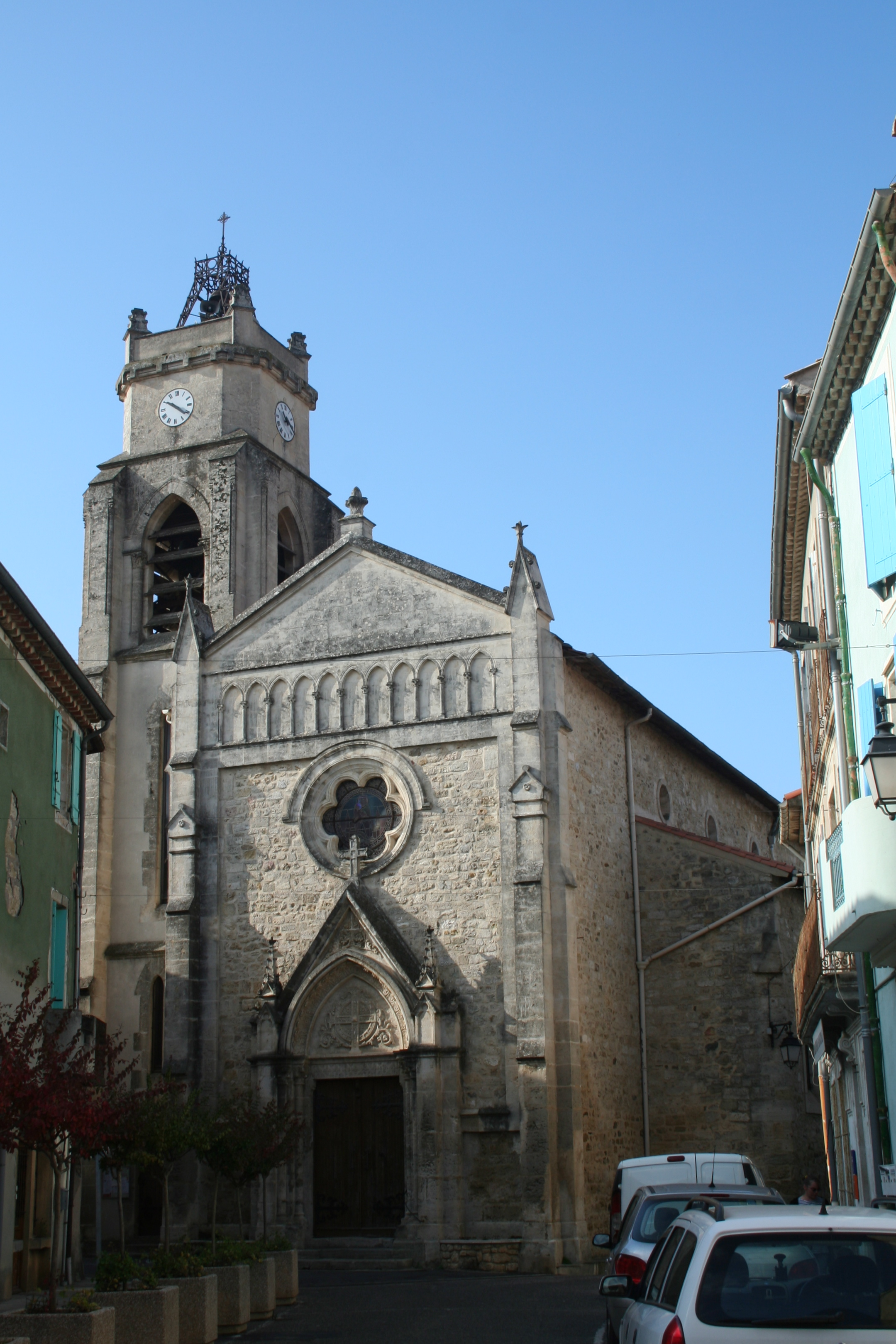 Autignac (Hérault) - église Saint-Martin.